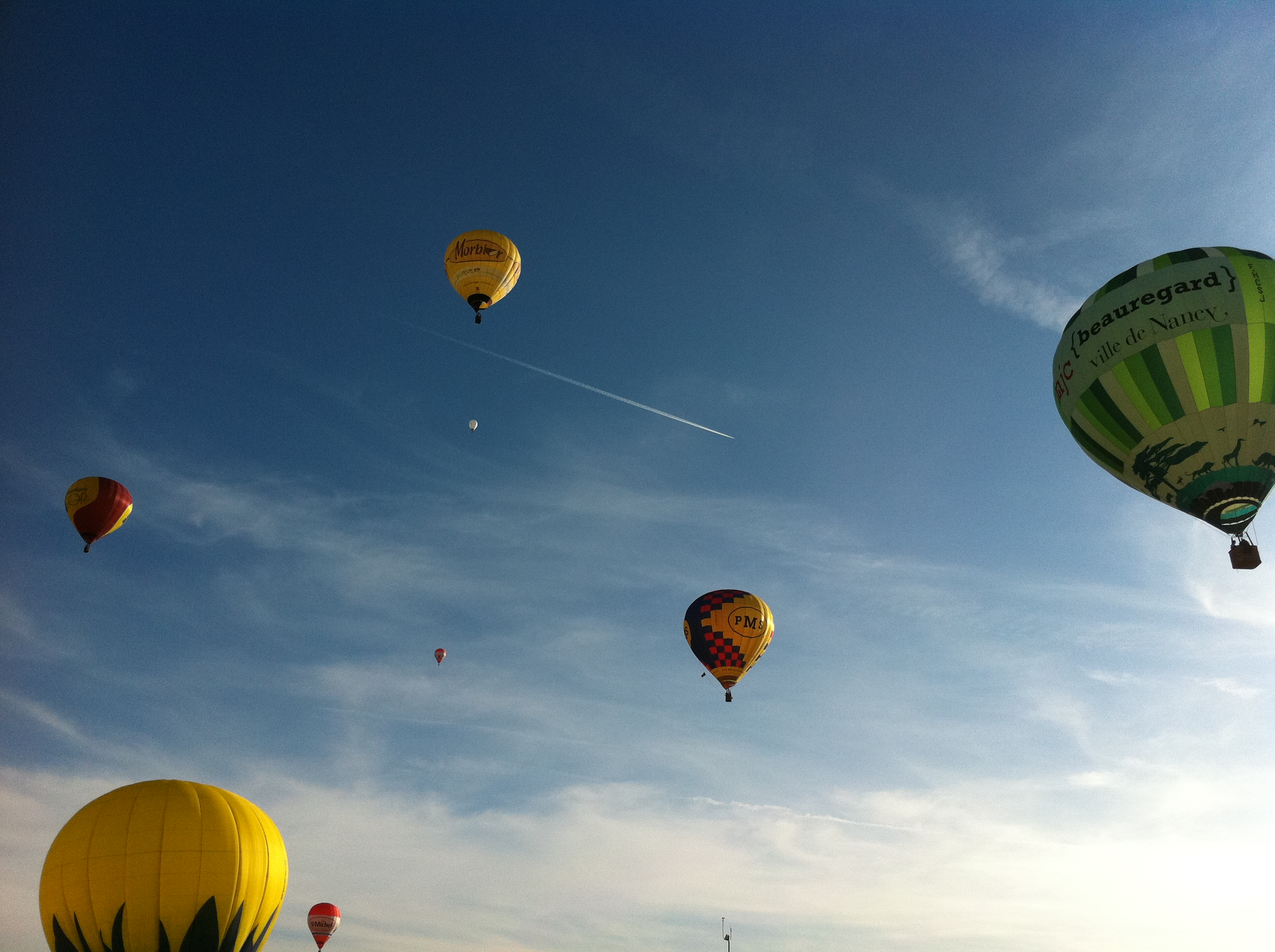 Mongolfiades organisées par l'ENSTIB à Epinal le 2 juin 2012